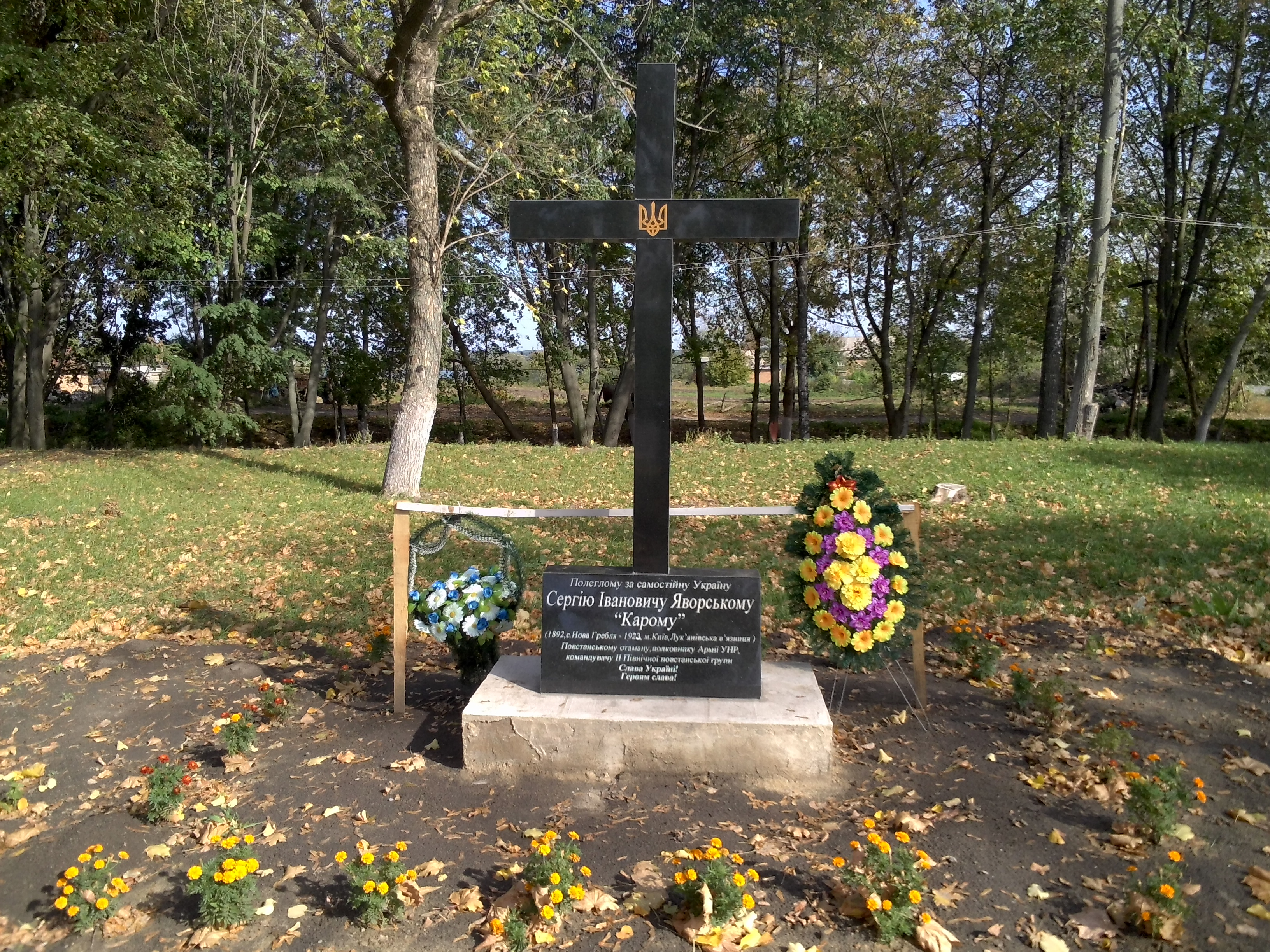 с. Нова Гребля. Пам'ять про видатного уродженця села С. Яворського